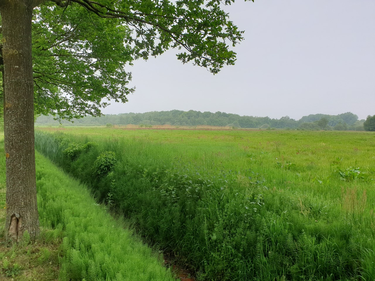 Het Dommeldal-Zuid ten zuiden Eindhoven